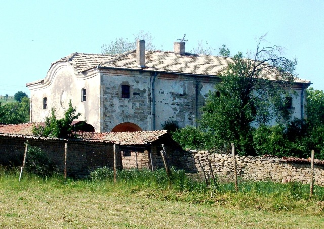 Църковният храм "Св. Архангел Михаил" на село Конак, община Попово - 19.05.2008 год. Фото: Вл. Стойков